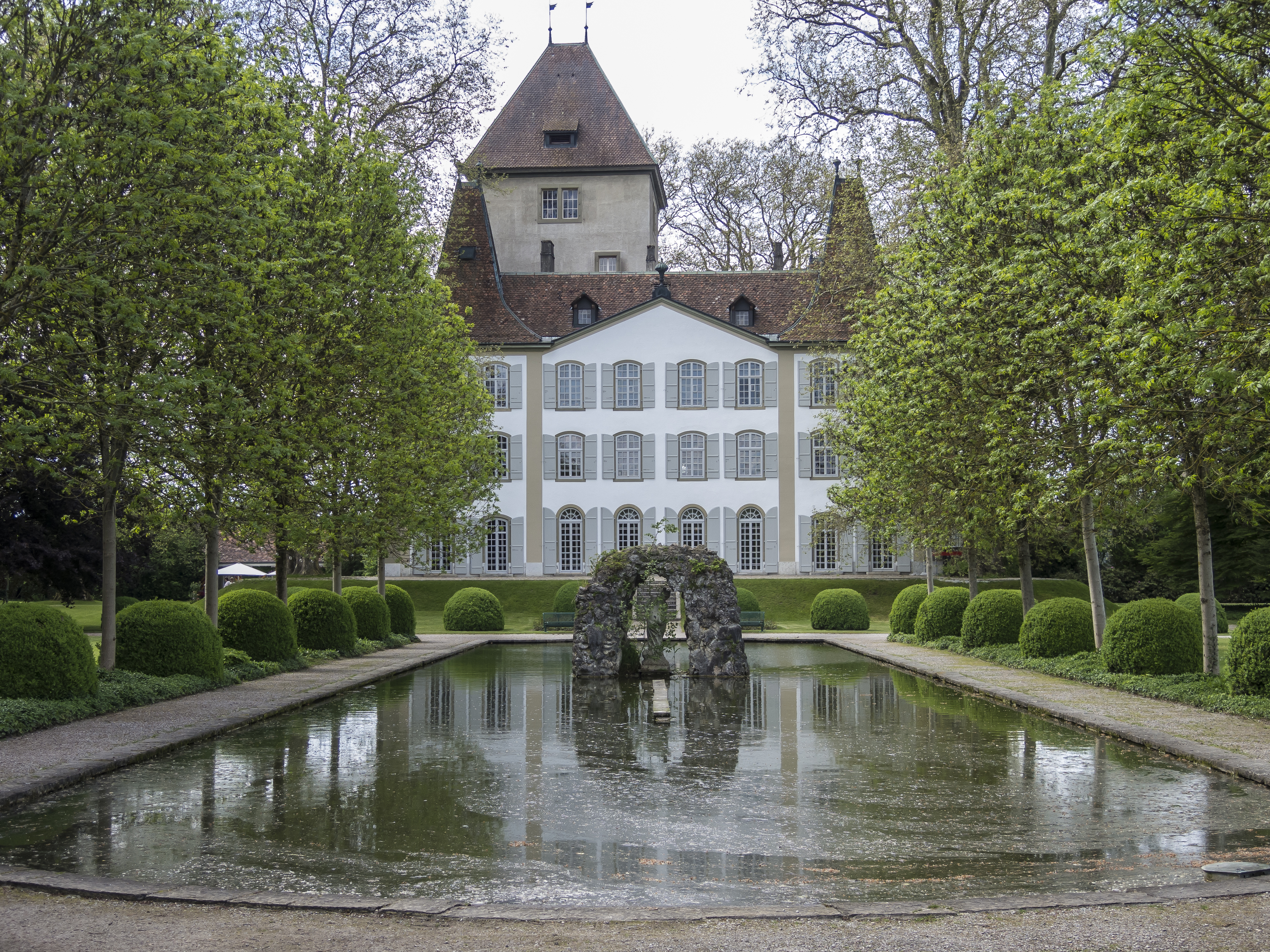 Schloss Jegenstorf mit Parkanlage und Teich